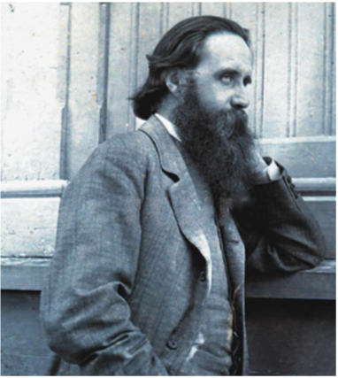 Федір Штейнгель - український політичний і культурний діяч, дипломат.